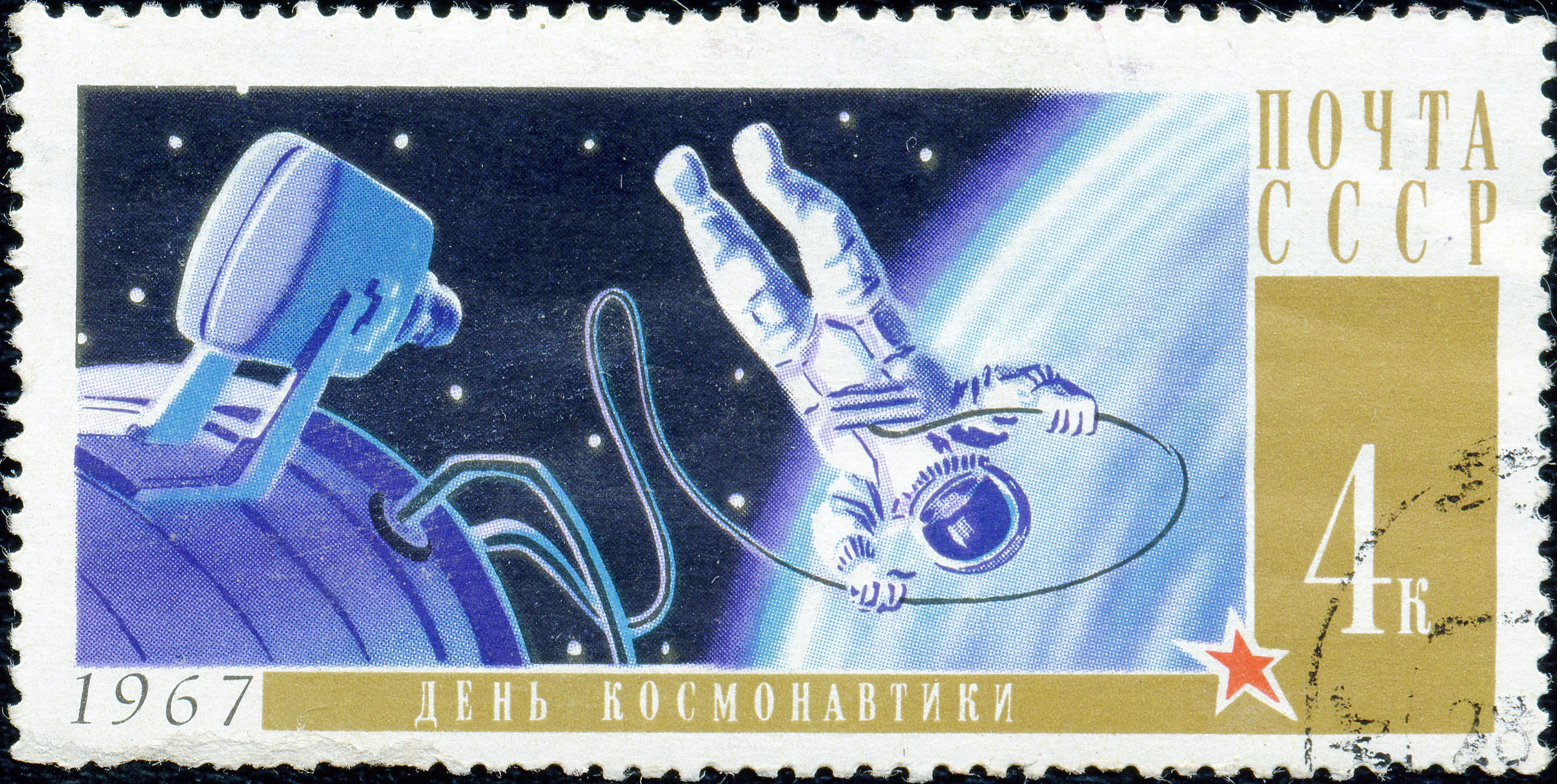 Почтовая марка СССР. 1967. День космонавтики